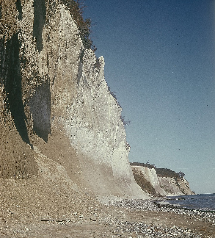 Original image description from the Deutsche Fotothek Rügen. Jasmund, Gakower Ufer bei Saßnitz, Kreideküste